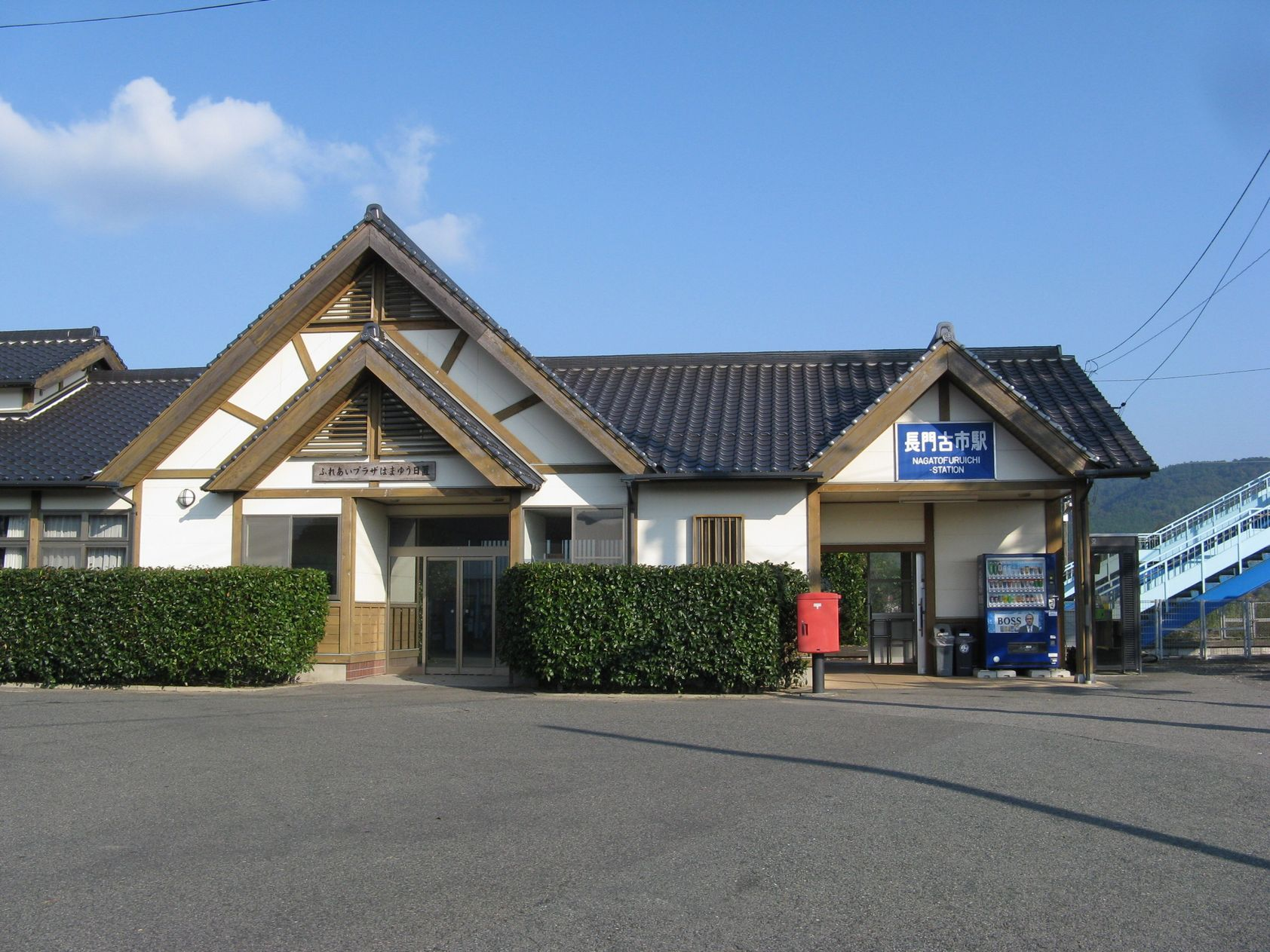 山陰本線長門古市駅 駅舎 2009年10月16日 Bakkai撮影 Category:西日本旅客鉄道の鉄道駅画像 Category:長門市の画像